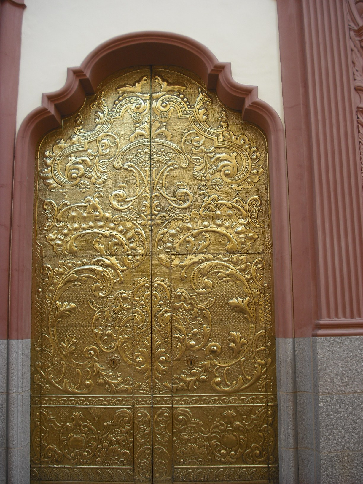 Porta daurada de l'església de la Sang de Nules.